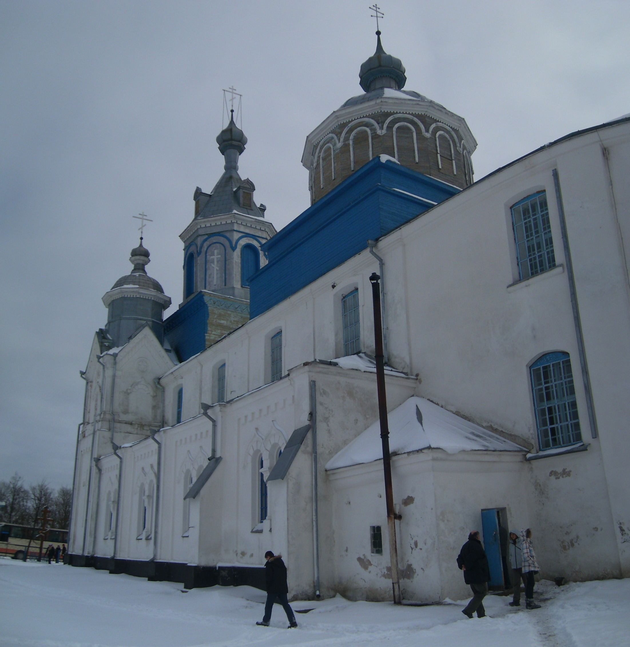 Беларуская (тарашкевіца): Пакроўская царква. Крывошын This is a photo of Belarusian heritage monument. Reference number: 112Г000476 ( WLM)